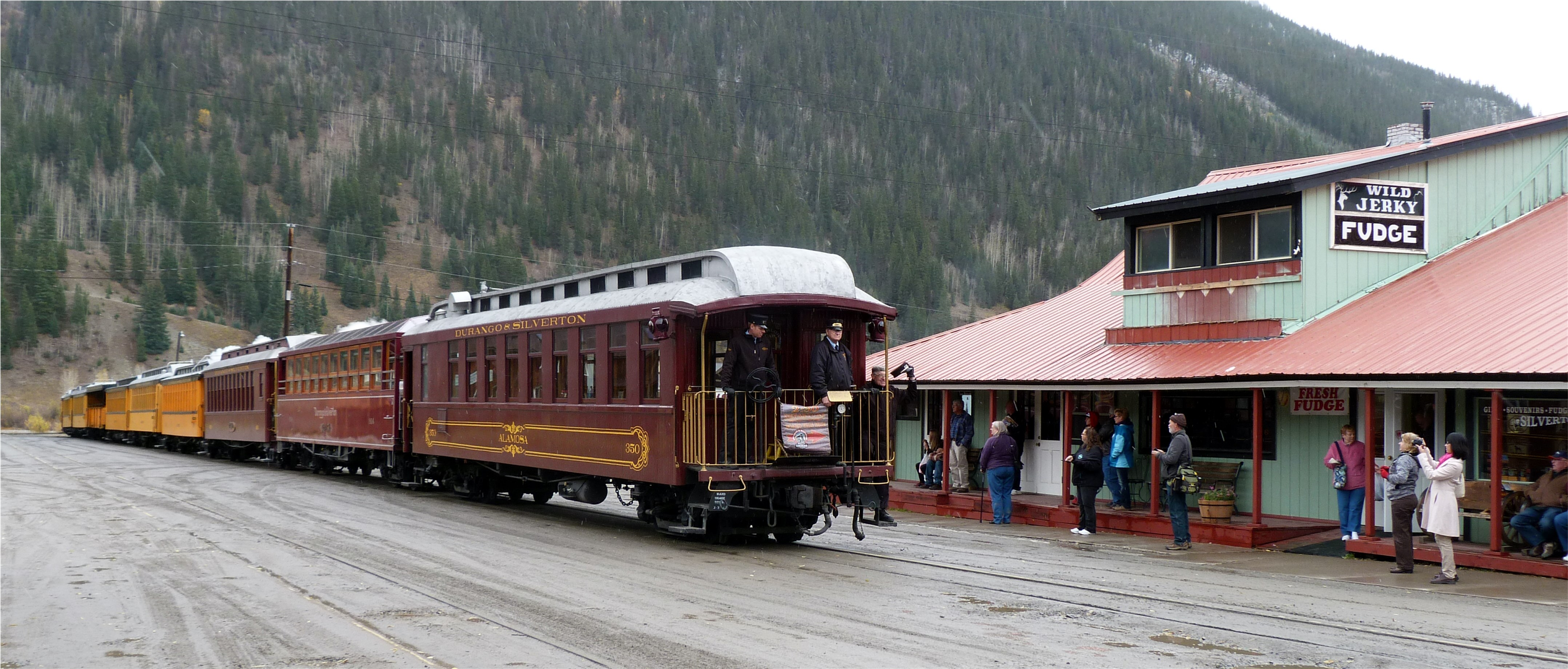 Rame de wagons en gare de Silverton, Colorado, Etats-Unis.